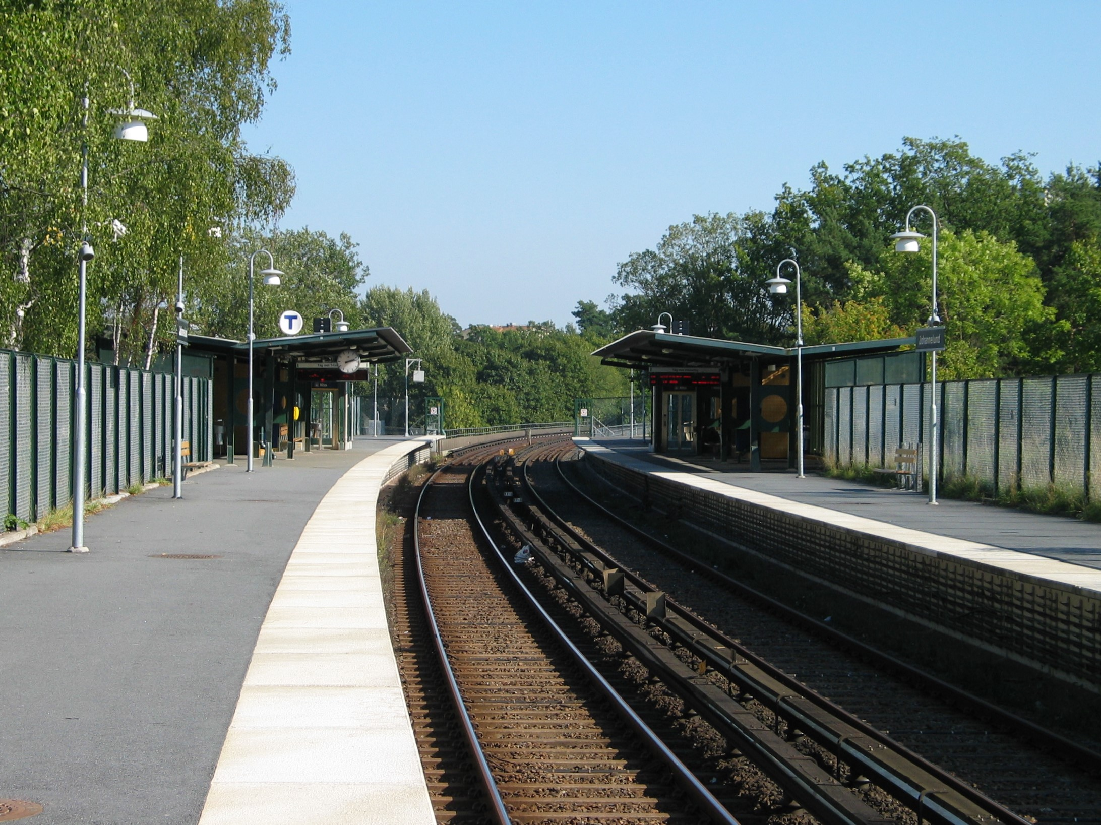 Johannelund, a metro station in Stockholm, Sweden.